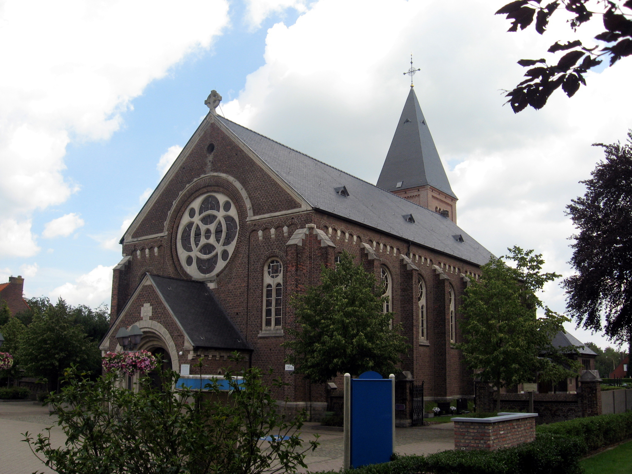 Sint-Jozefkerk in Olen